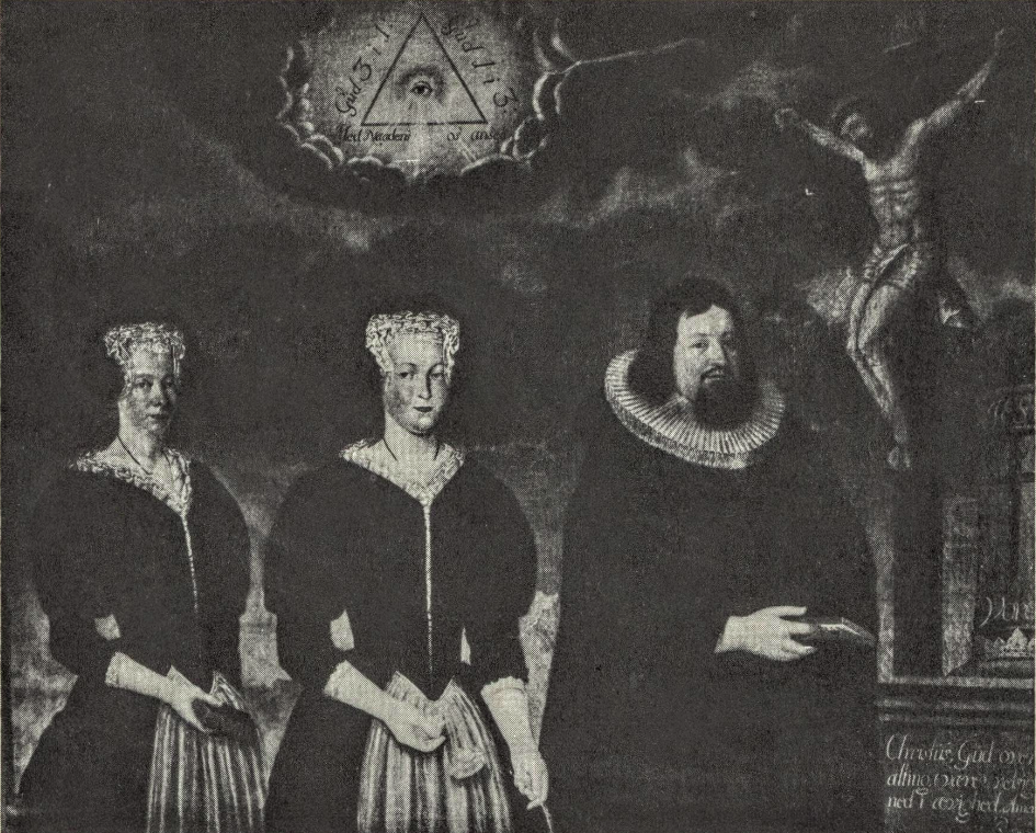 Bildetekst: "Sogneprest Niels Nielsen Griis til Sigdal,d. 1704, m. 2 hustruer Boel Hansdatter d. 1686 o. Rebekka Johannesdatter Stenkuhl.204 cm. br. 168 cm. h.Sigdal Kirke." Dette er fra Holmen Kirke i Sigdal der Niels Niesen Griis (død 1704) var prest, gift Bodil Hansdtr. Deres sønn Niels Griis (1672–1746) ble prest og diplomat. Niels (sr.) giftet seg igjen med Rebekka Stenkuhl (1667–1728), og det nevnes ikke hvordan kunstneren har klart å få alle tre inn på samme bilde samtidig.